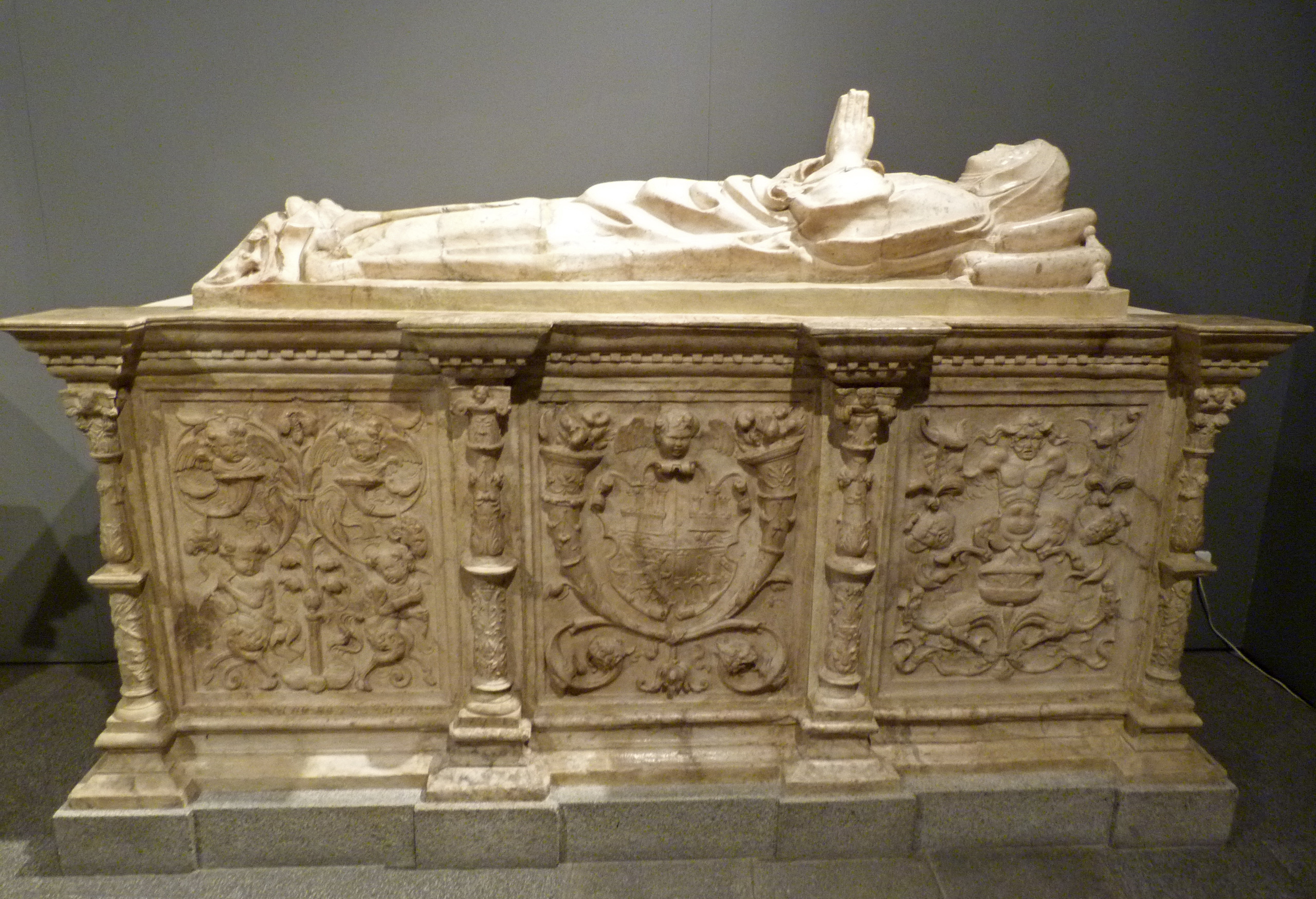 Monumento funerario renacentista a Beatriz Galindo, realizado hacia 1531 que se conserva junto a su esposo Francisco Ramírez en el Museo de los Orígenes de Madrid.